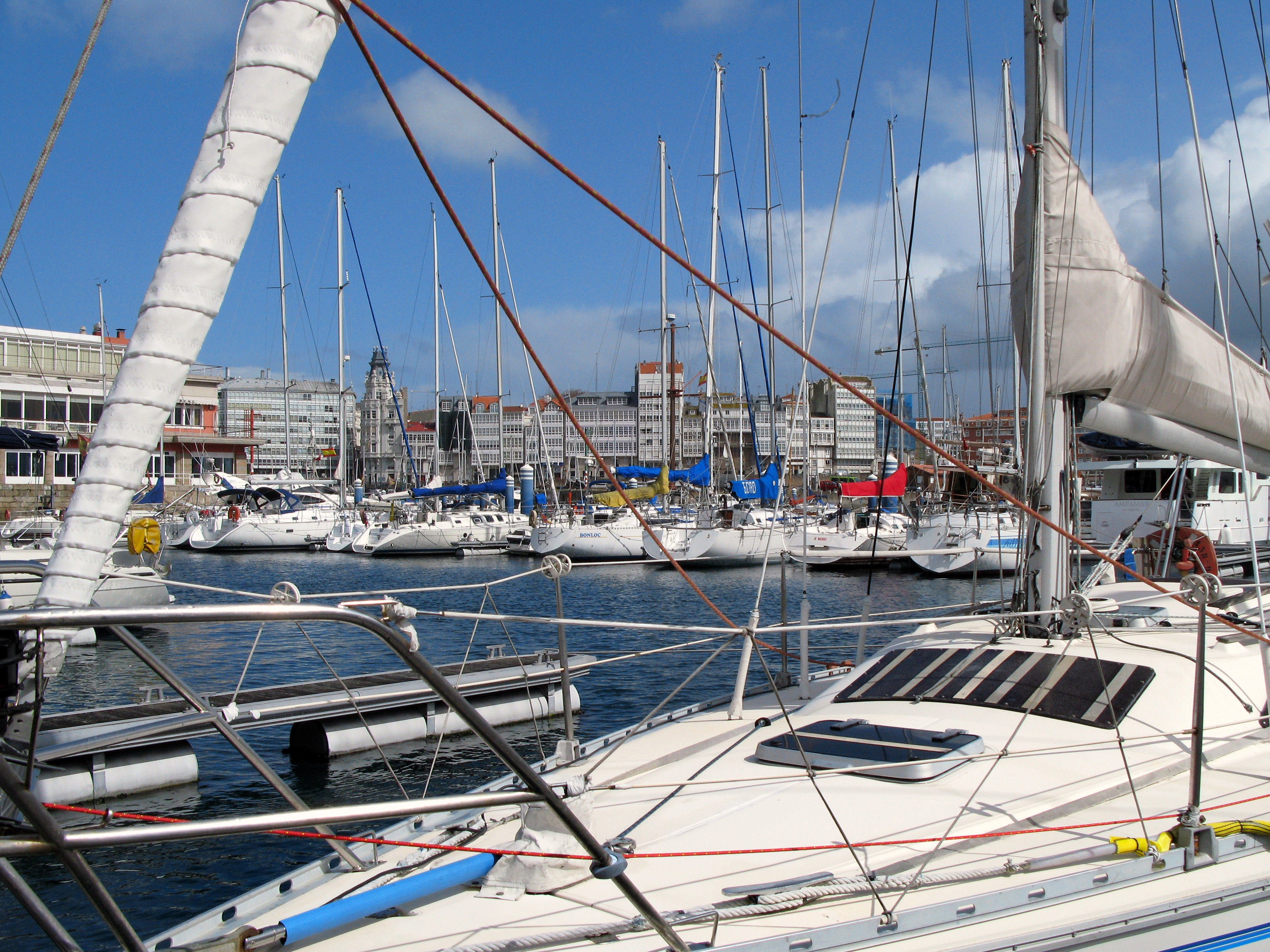 Porto deportivo da Coruña. Galiza